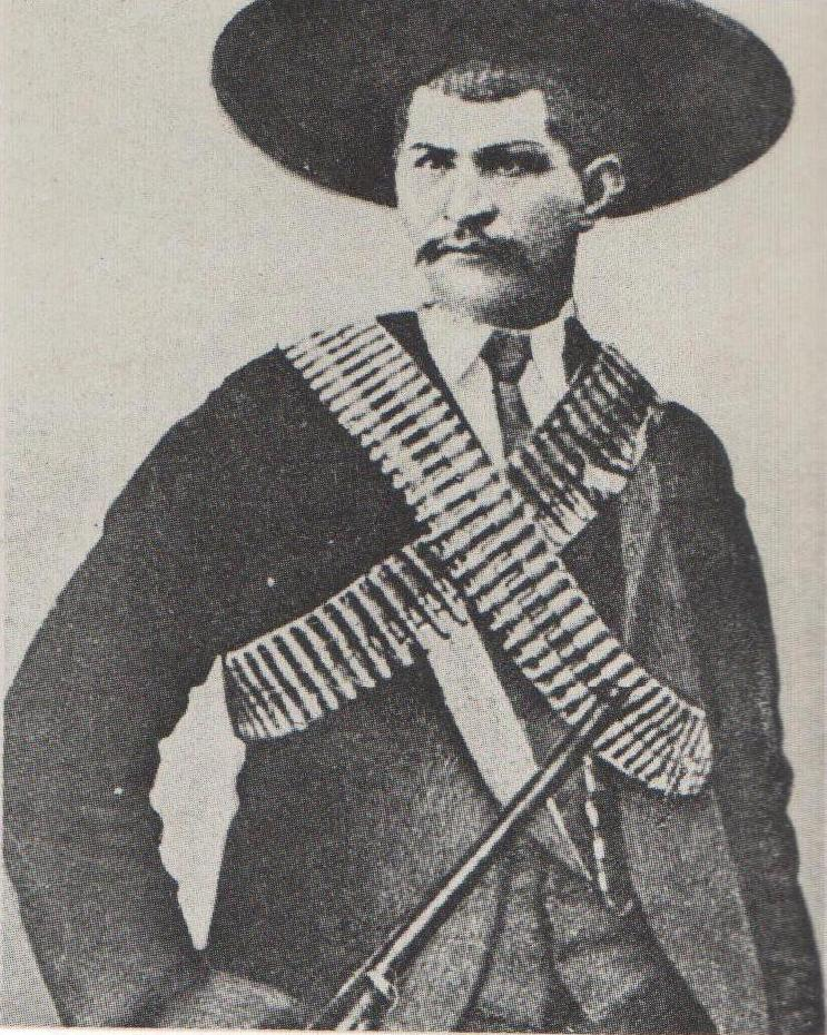 General Lucio Moreno